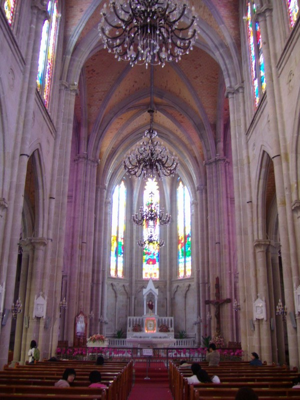 广州石室圣心大教堂内景